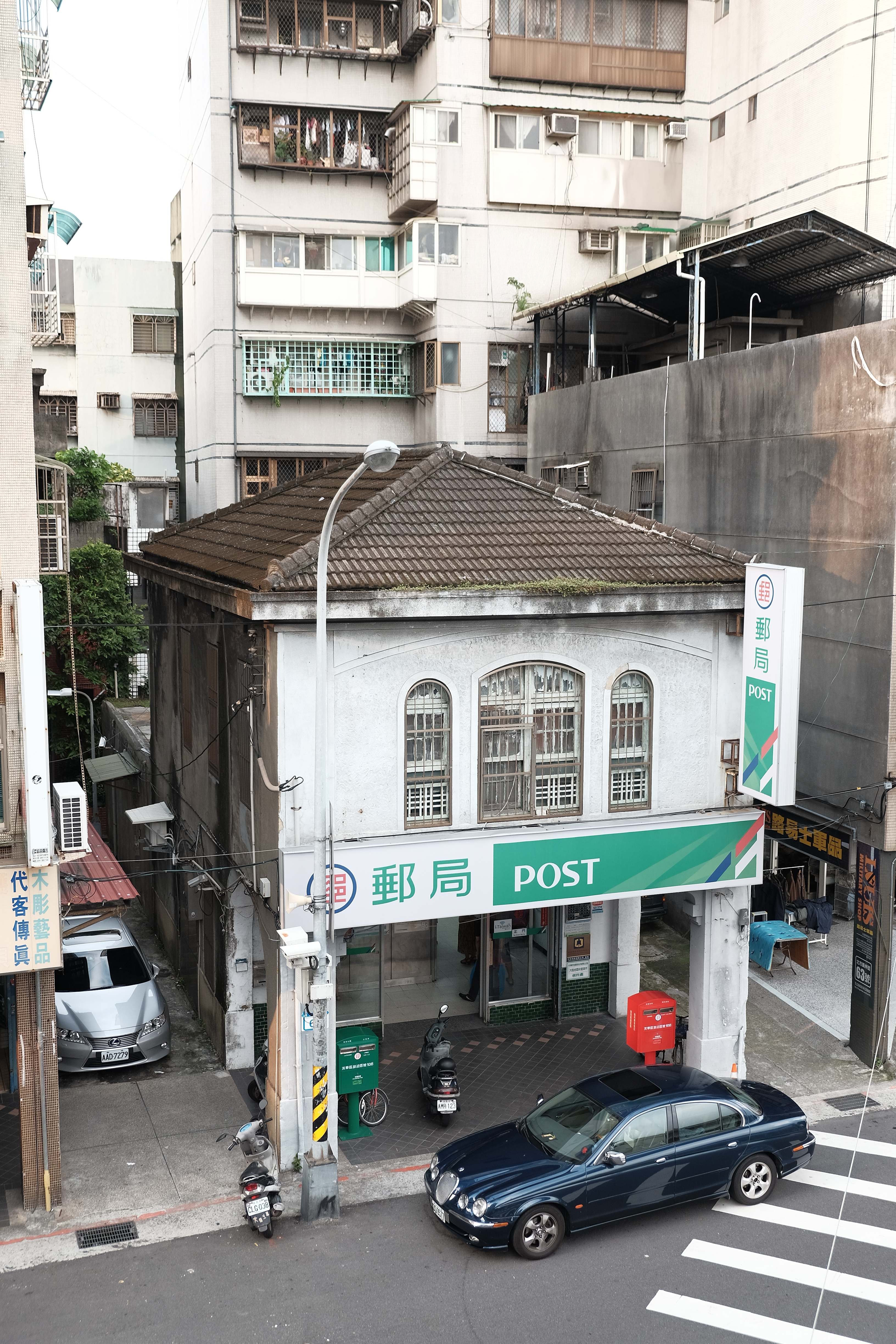 臺北龍山郵局，位於臺北市萬華區廣州街67號，原八甲町郵便局。